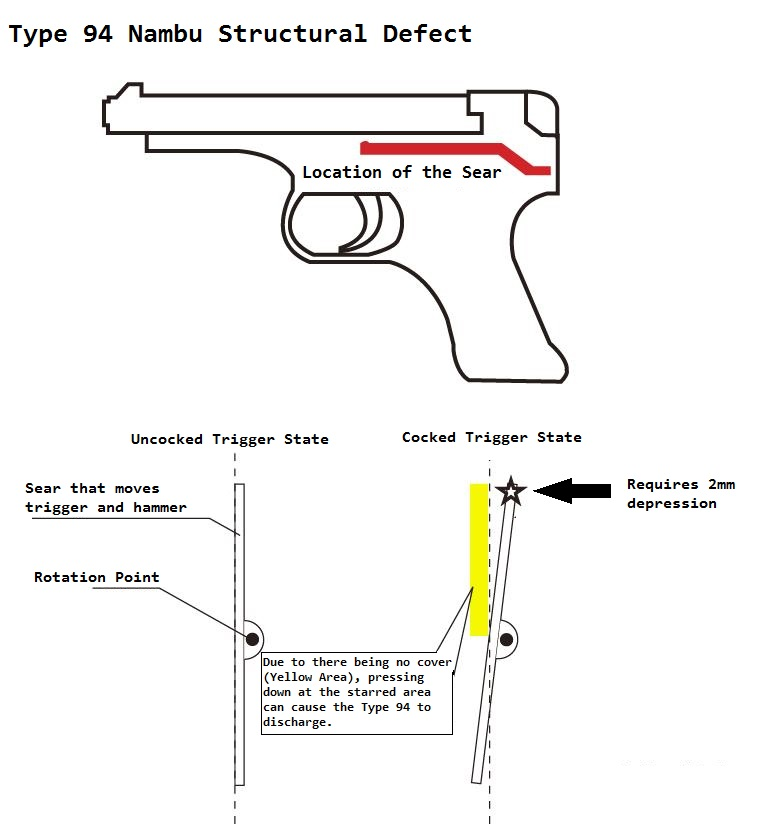 九四式拳銃の構造的欠陥の図説